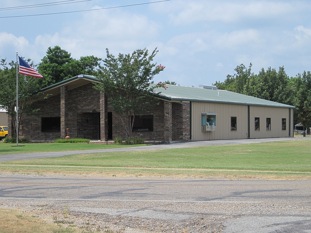 Bay, Arkansas City Hall